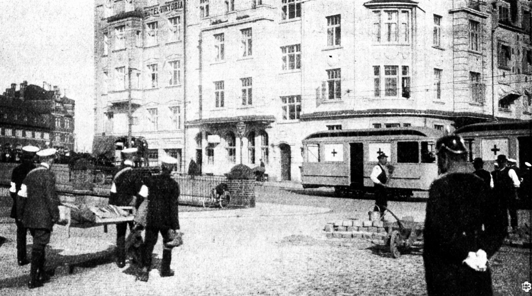 Transport deutscher Verwundeter in Lübeck mit den ehemaligen Fischwagen ins Barackenlazarett